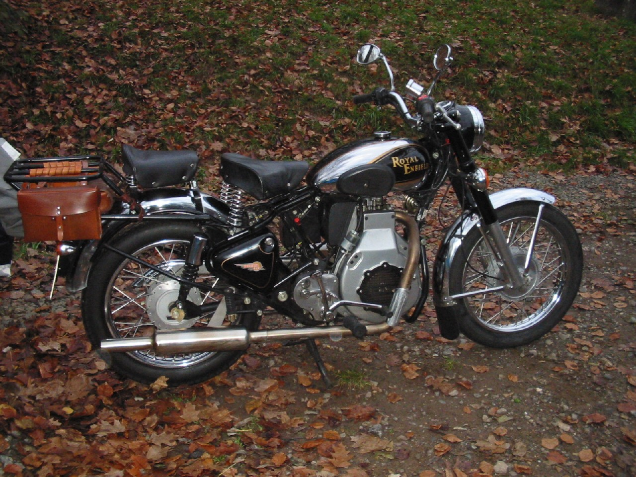 Emme1